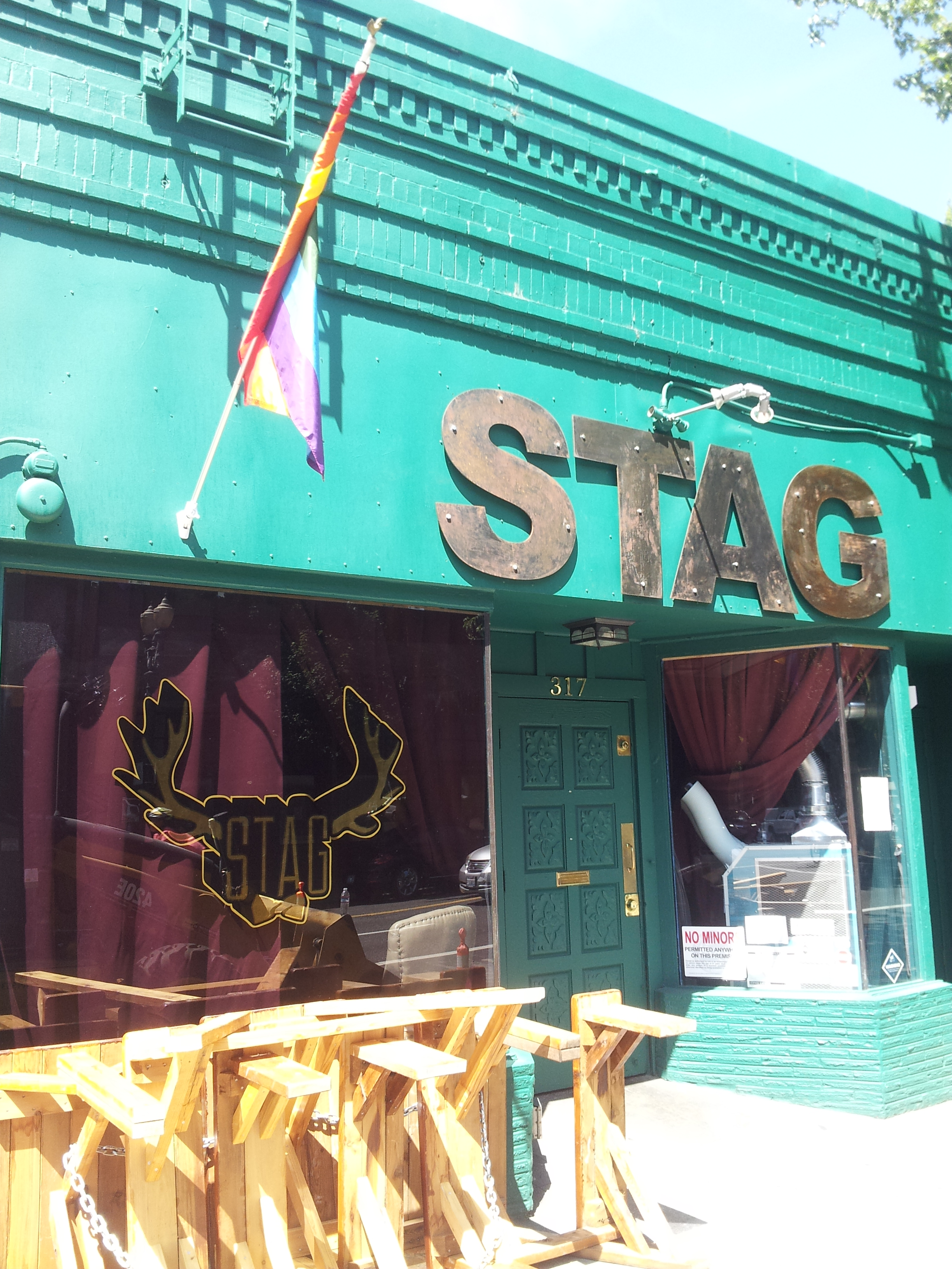 Stag PDX, Oregon (2015)